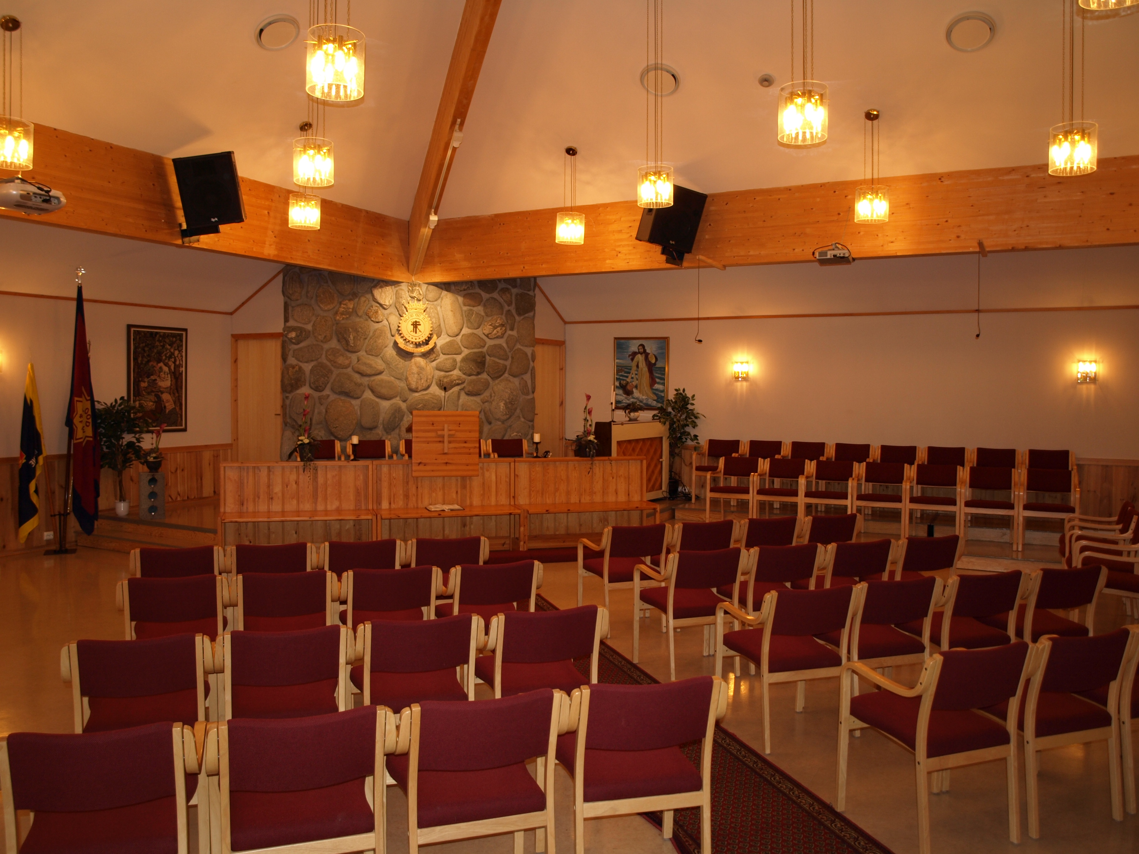 Bilder fra Frelsesarmeen Brynes lokaler